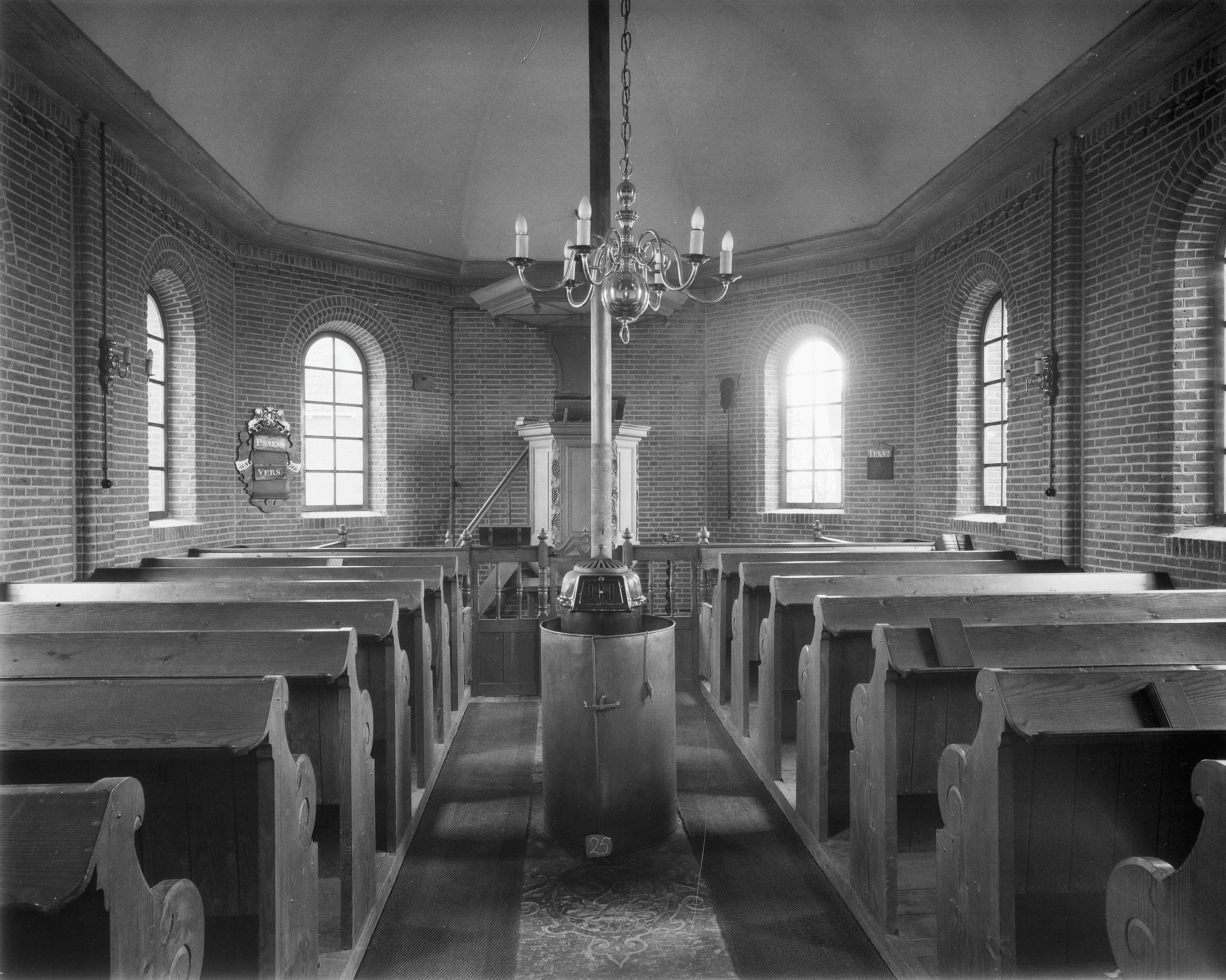 N.H.Kerk: interieur